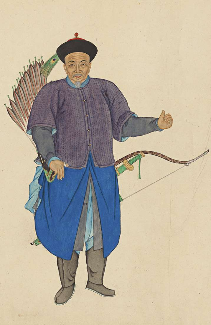 《御筆平定臺灣二十功臣像贊》中的許世亨畫像，2014年由紐約iGavel拍賣行拍賣。